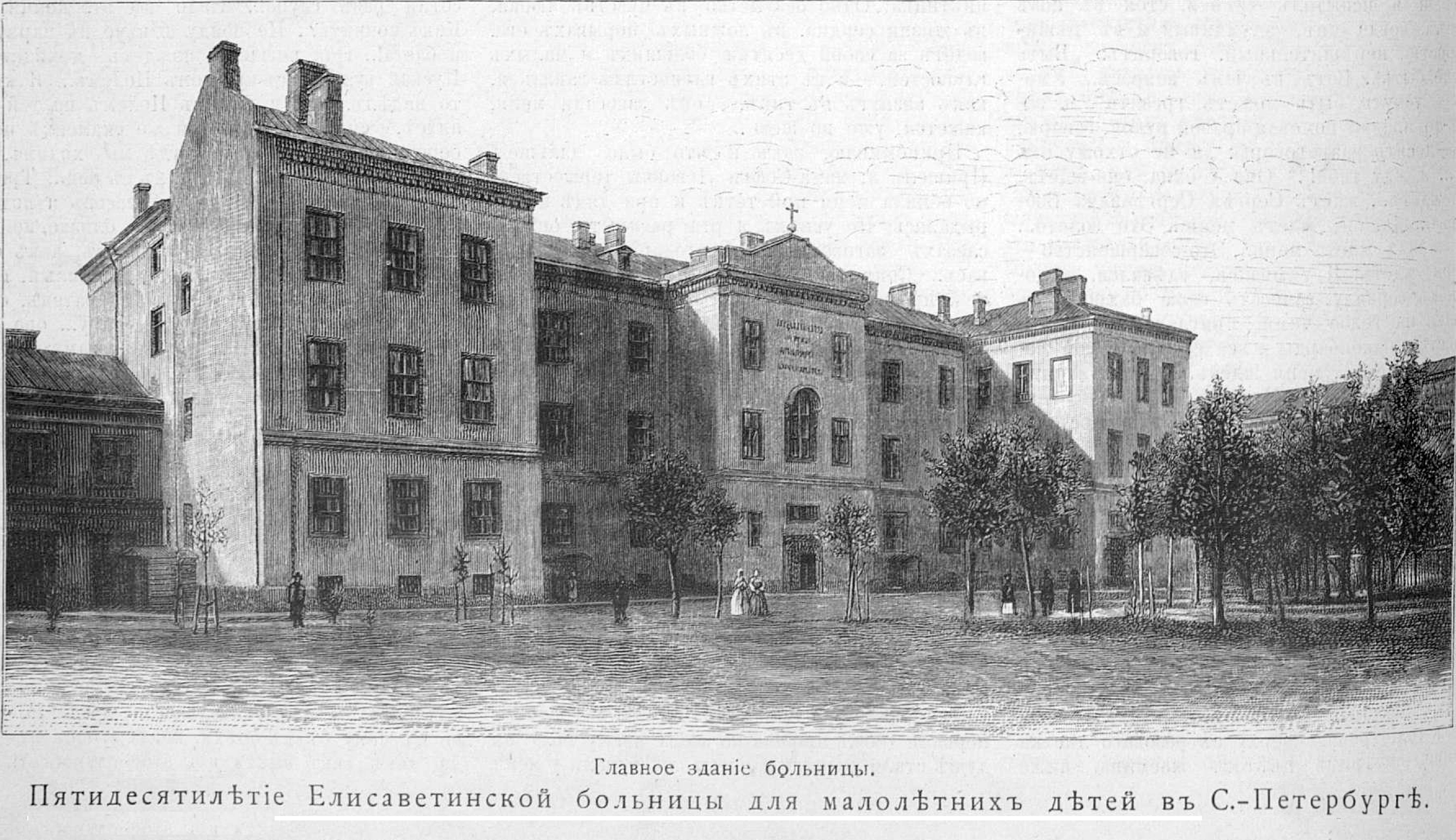 Елизаветинская больница в Санкт-Петербурге, 1894 год.